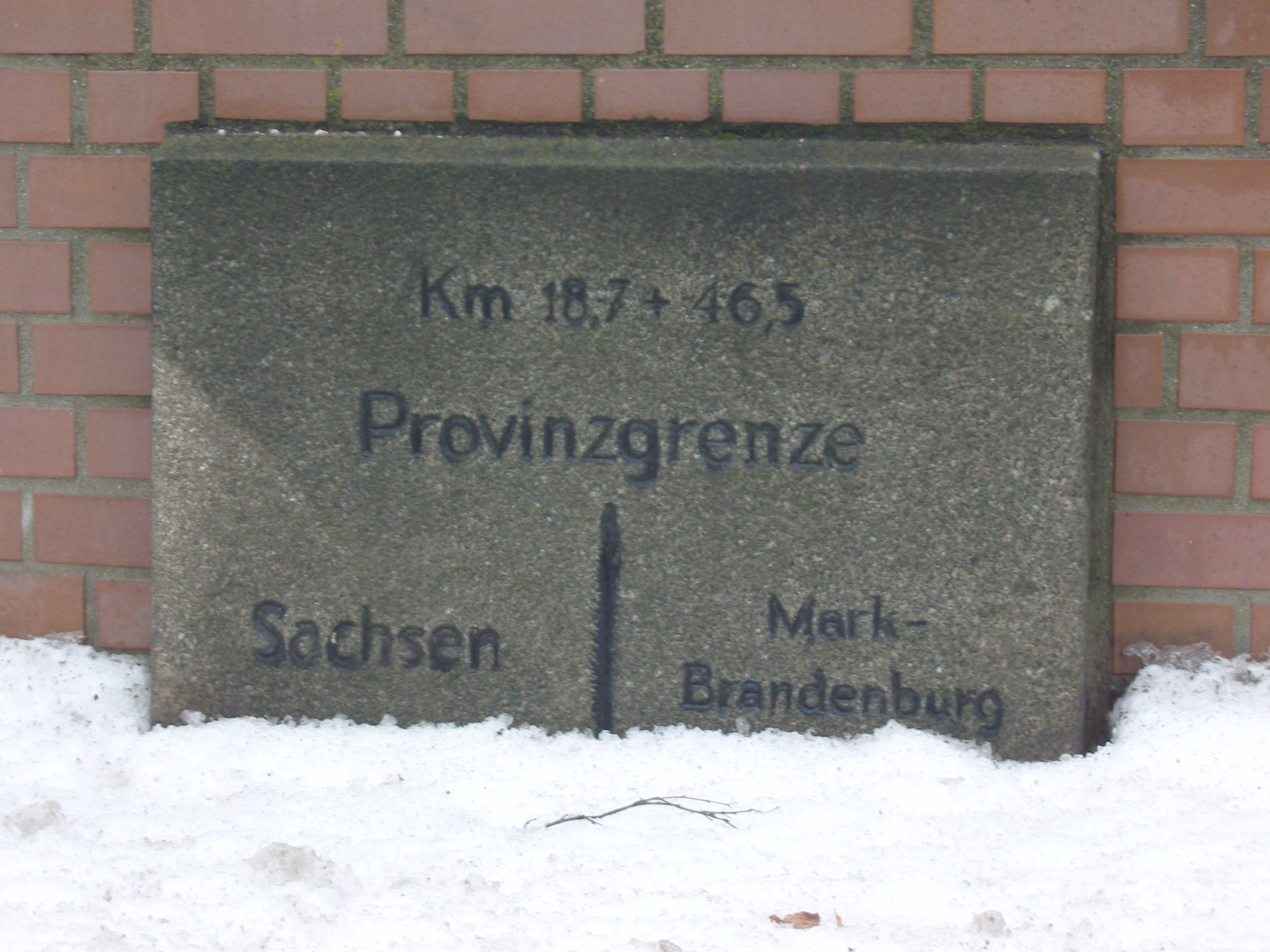 Grenzstein zwischen Lauchhammer-Ost (Sachsen) und Kostebrau (Brandenburg)